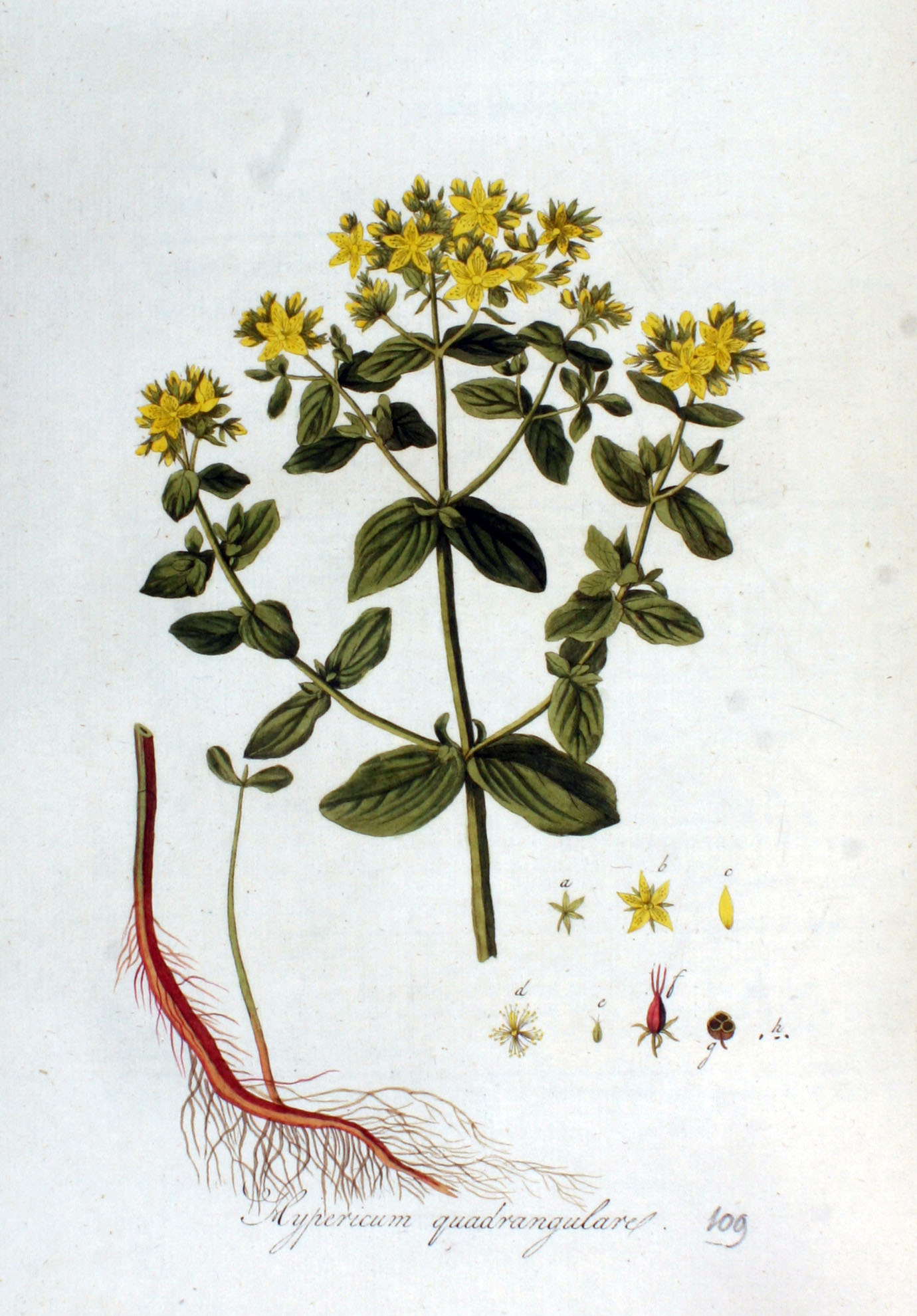 Hypericum tetrapterum Fries (Syn. Hypericum quadrangulum L., nom. rejic., Hypericum quadrangulare Willd.)